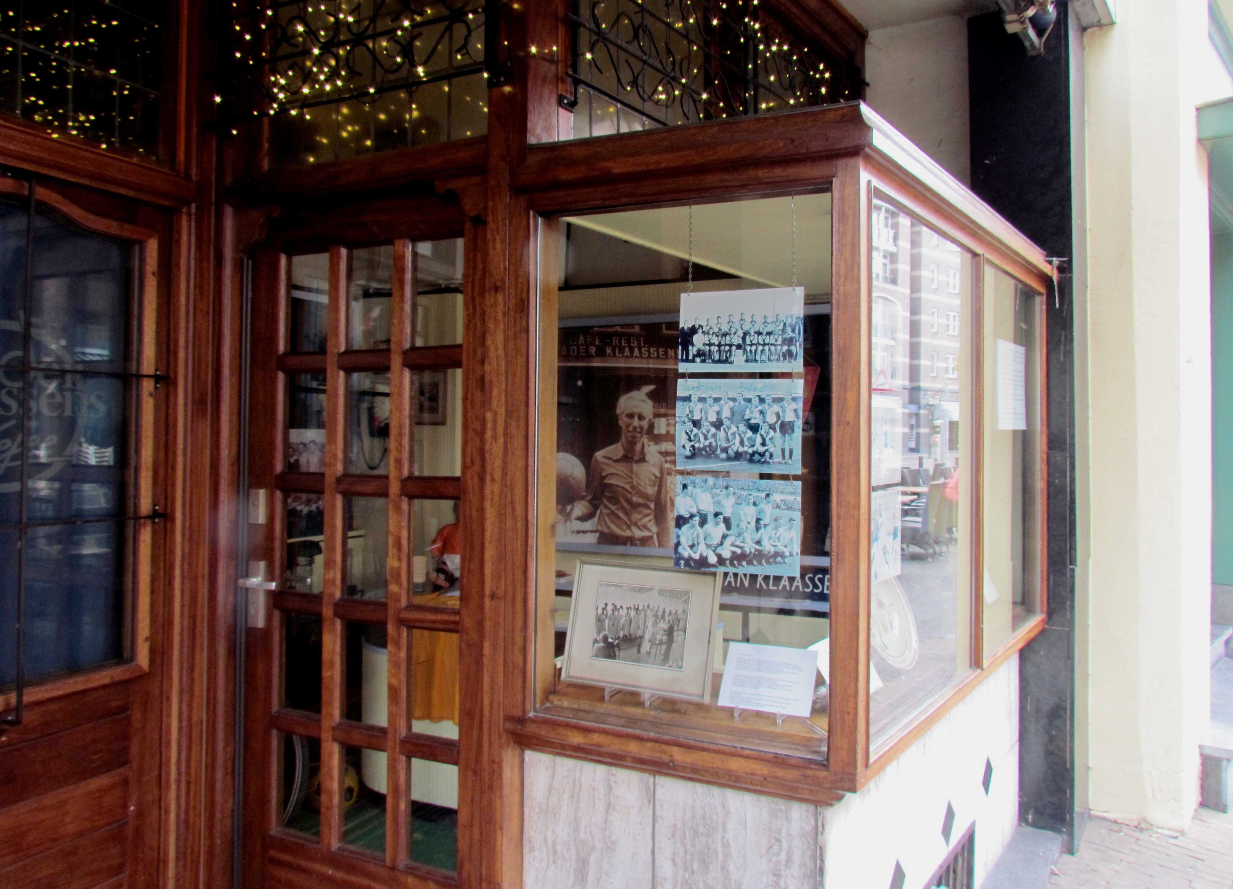 Het "Jan Klaassens Museum", Parade 67c in Venlo (NL)